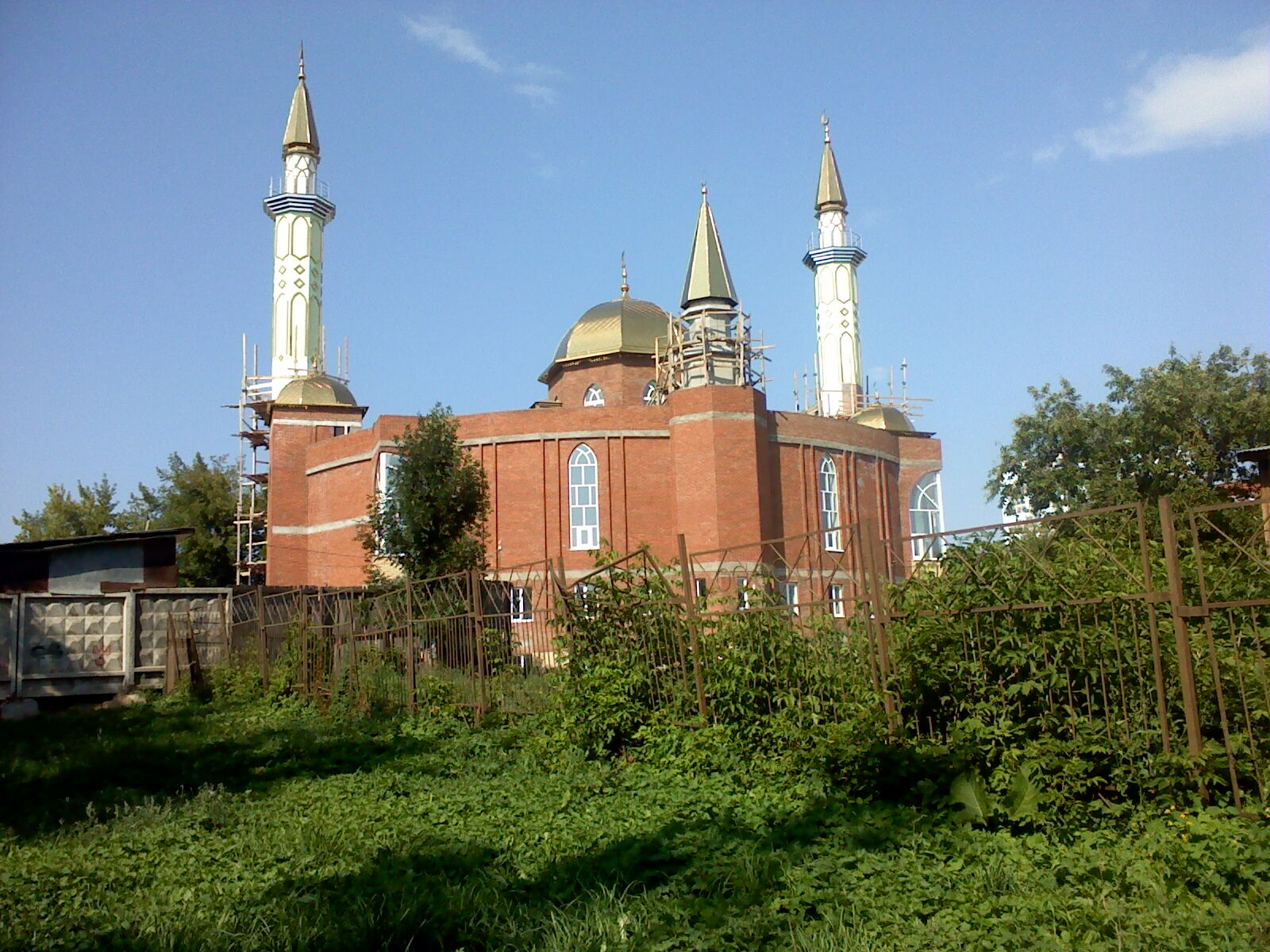 Строящаяся главная мечеть на улице Карла Маркса (Ижевск)